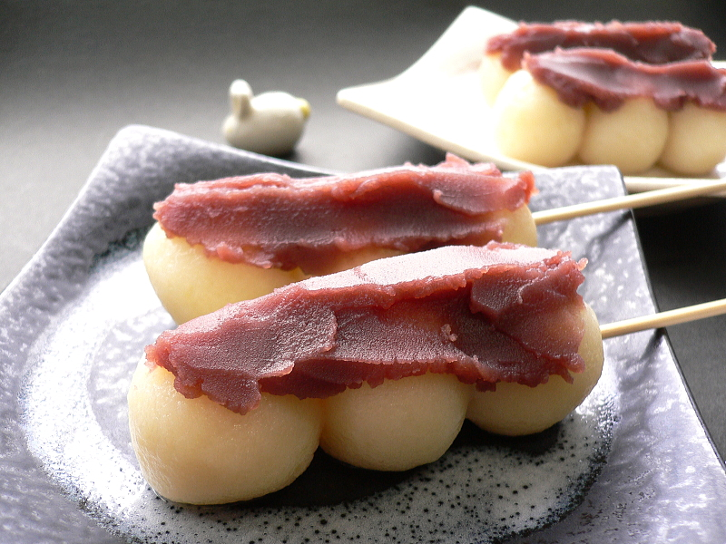 dumpling powder, sweetpotato, suger, water, sweet bean paste